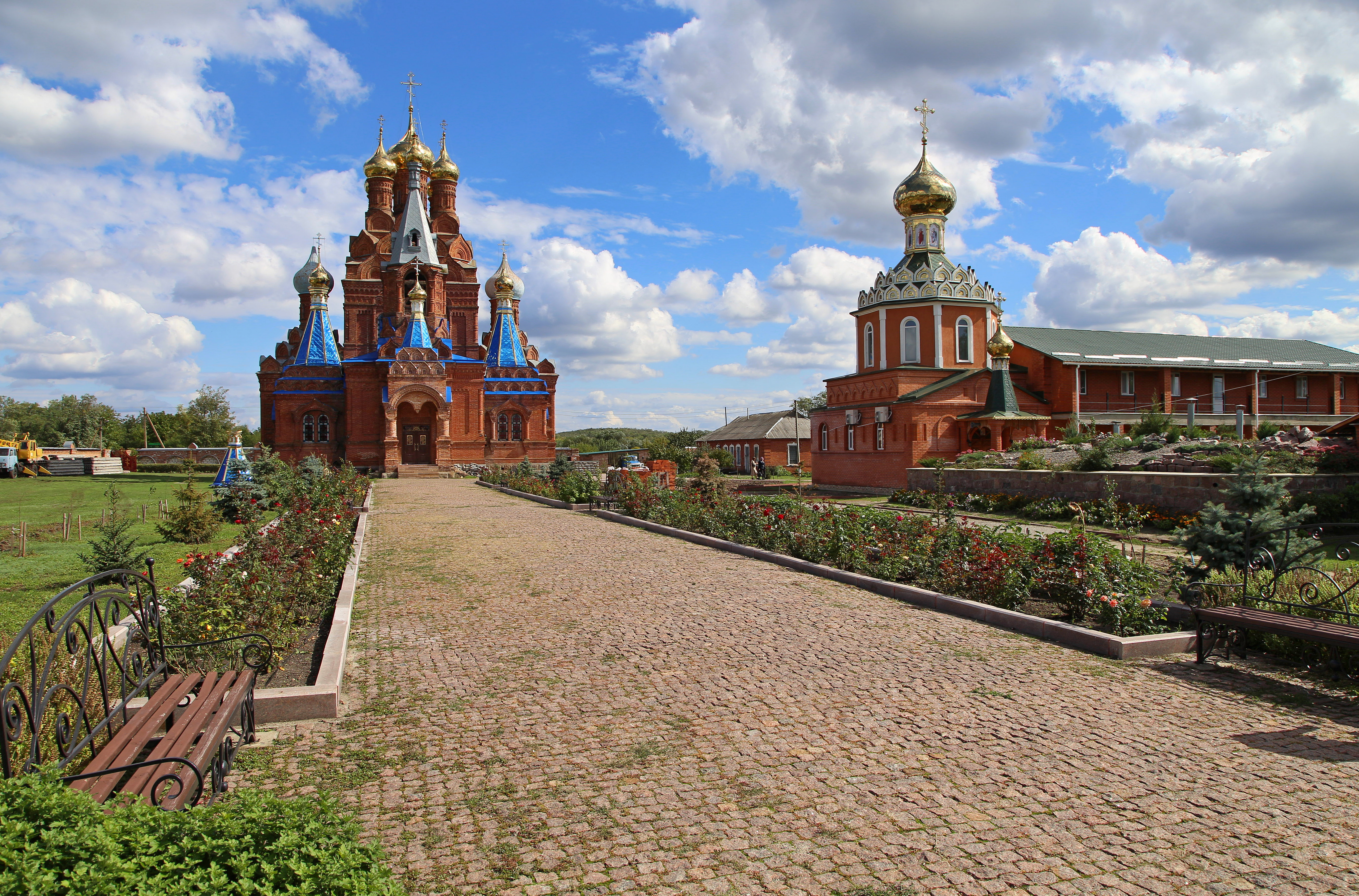 Пелагеївська церква., Новобузький район, Миколаївська область, Село Пелагіївка